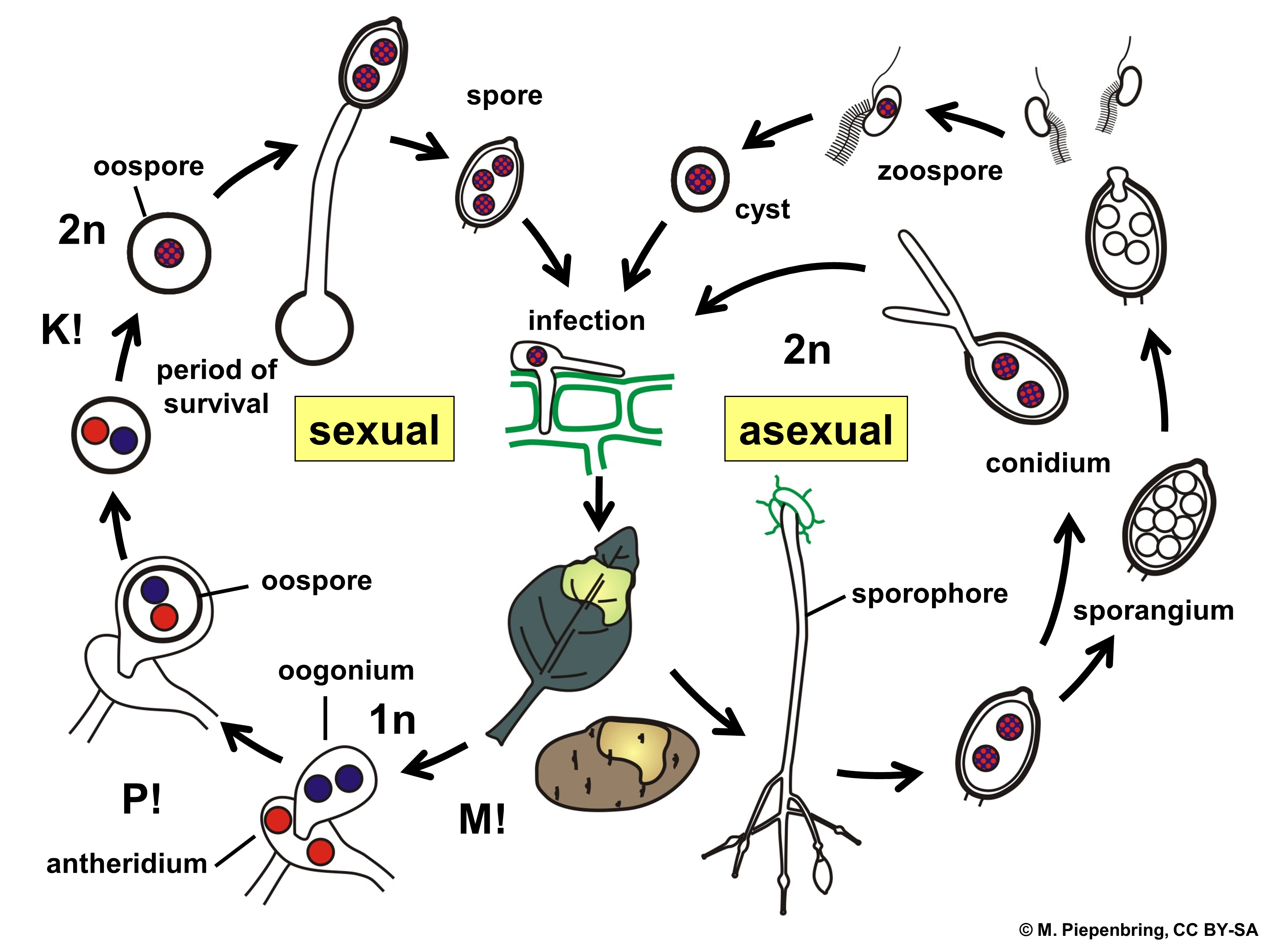 Biologische Schemata, gezeichnet und freigegeben von M. Piepenbring